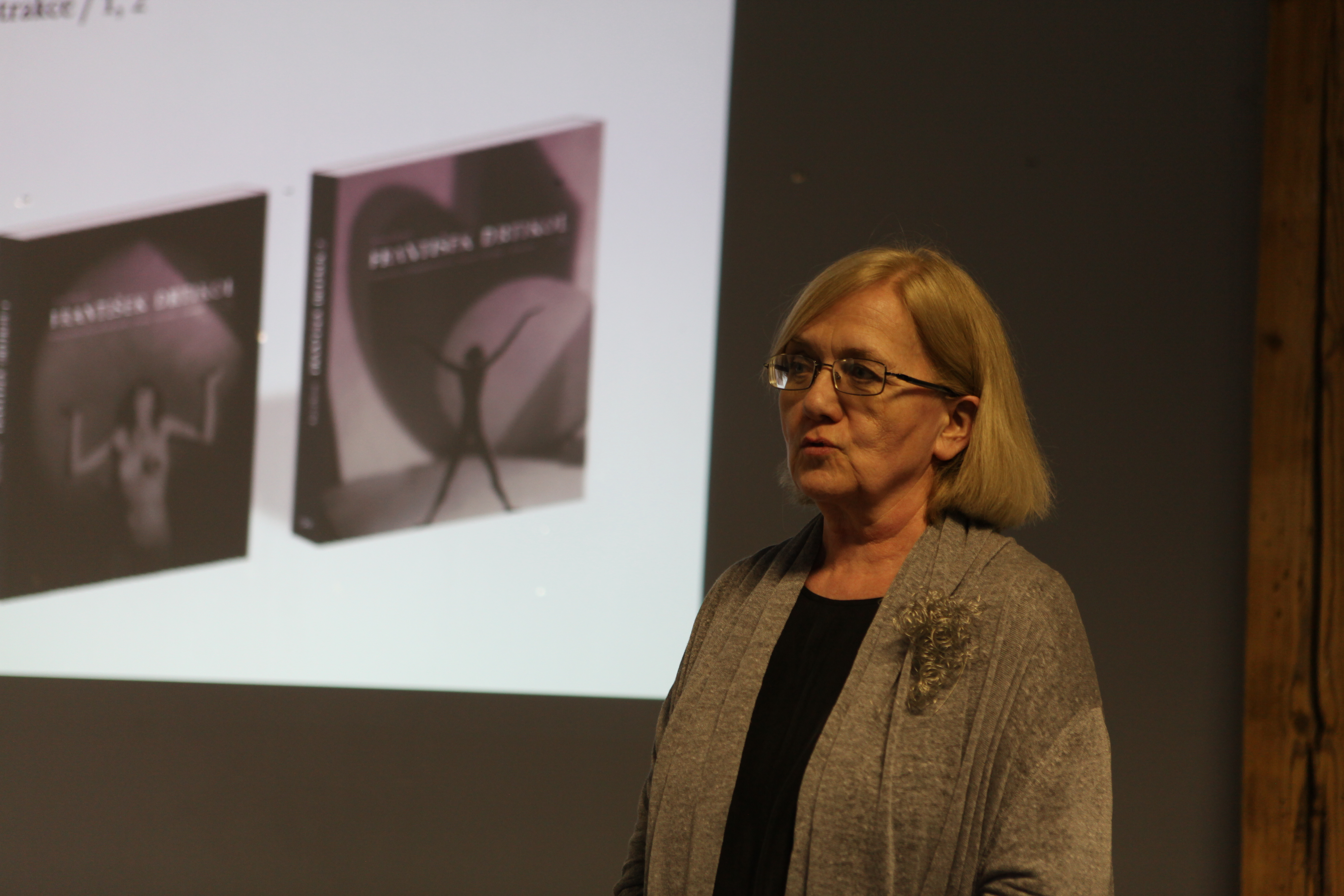 Expozice festivalu Prague Photo 2013, foto: Vít Švajcr Dobré světlo.com. Iva Nesvadbová